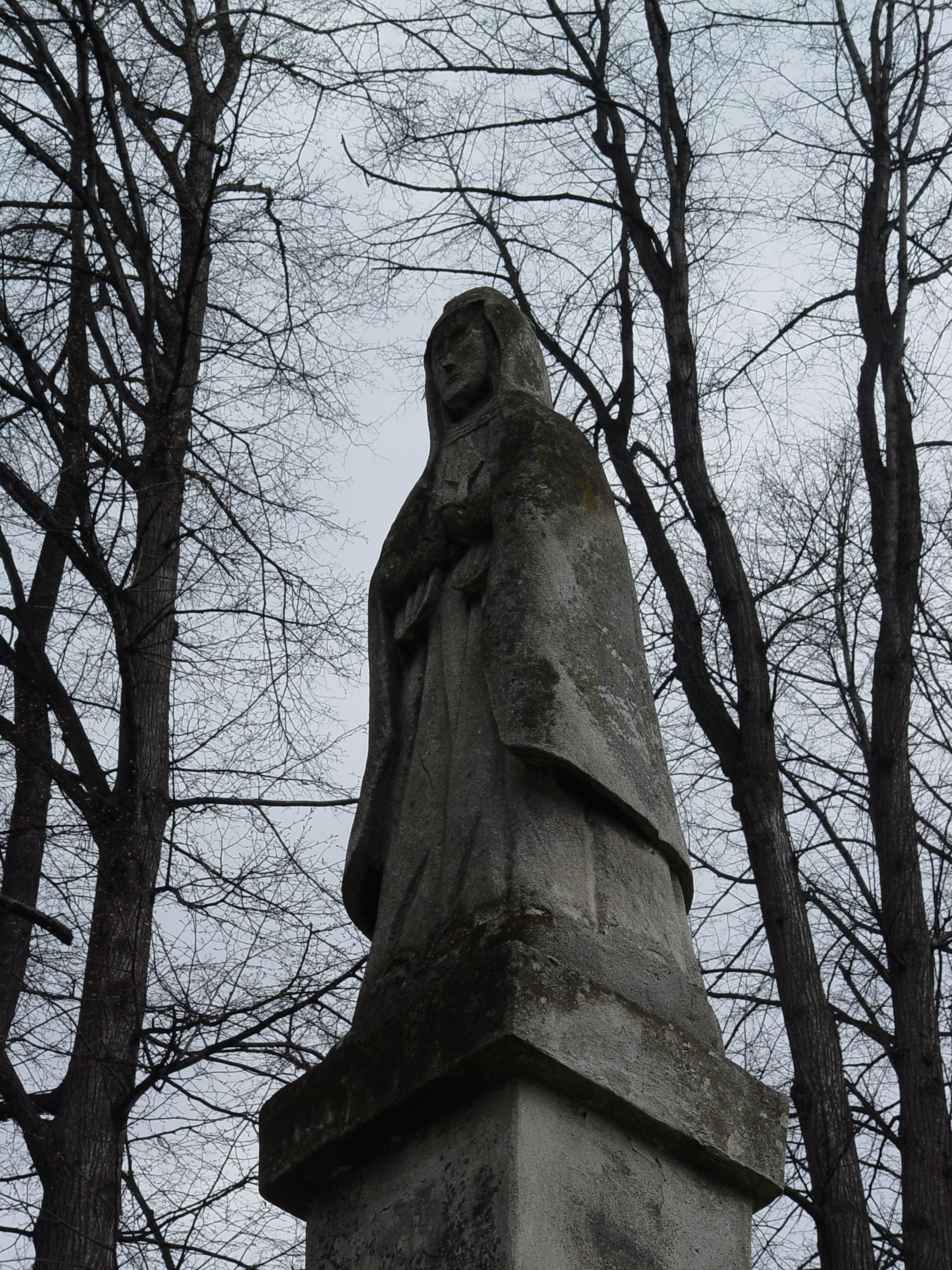 Aleja parkowa w Dębnie - pomnik św. Kingi